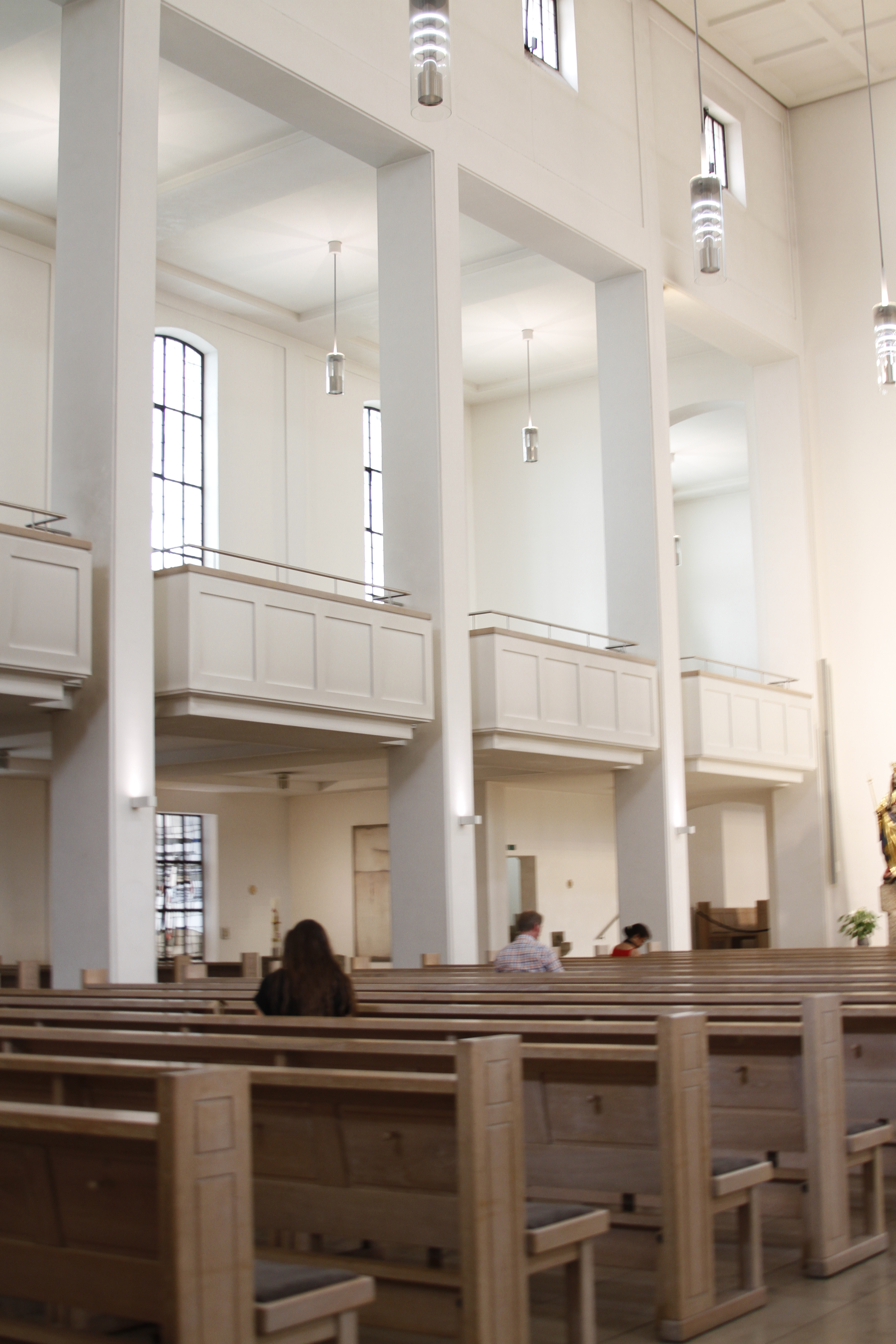 Domkirche St. Eberhard - Stuttgart - Germany